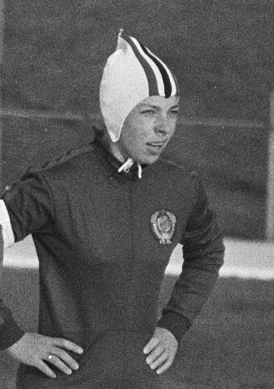 Tatyana Shelekhova